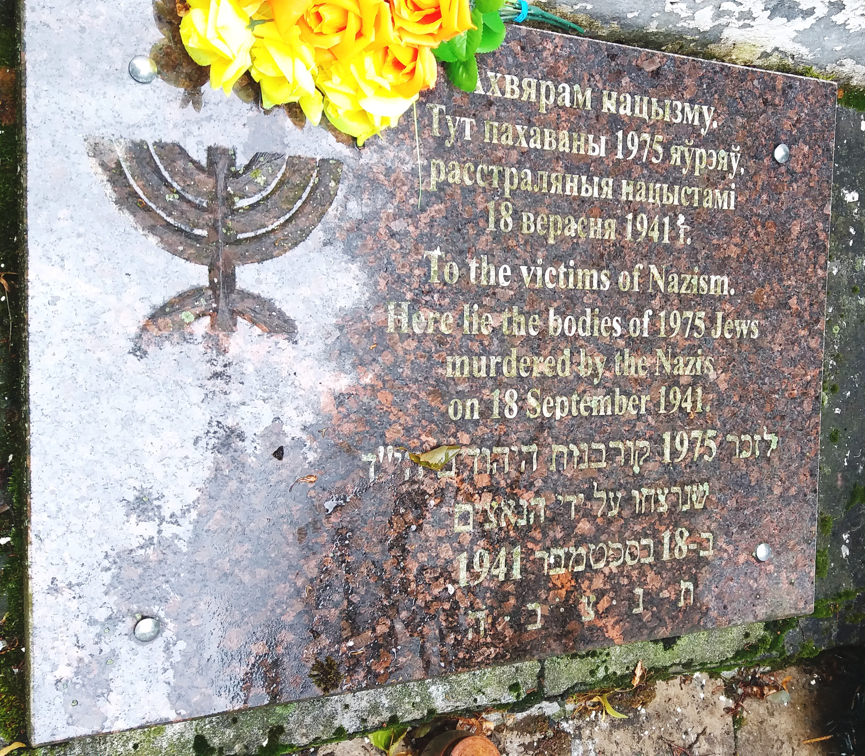 Памятник на месте расстрела евреев из города Крупки Минской области, а также евреев из Минска, Борисова и других населенных пунктов. Открыт в 1969 году. Представляет собой бетонную стелу с барельефом скорбящей женщины. Государственное воинское захоронение – номер знака 5370. Сама братская могила с останками убитых находится справа от памятника в низине.